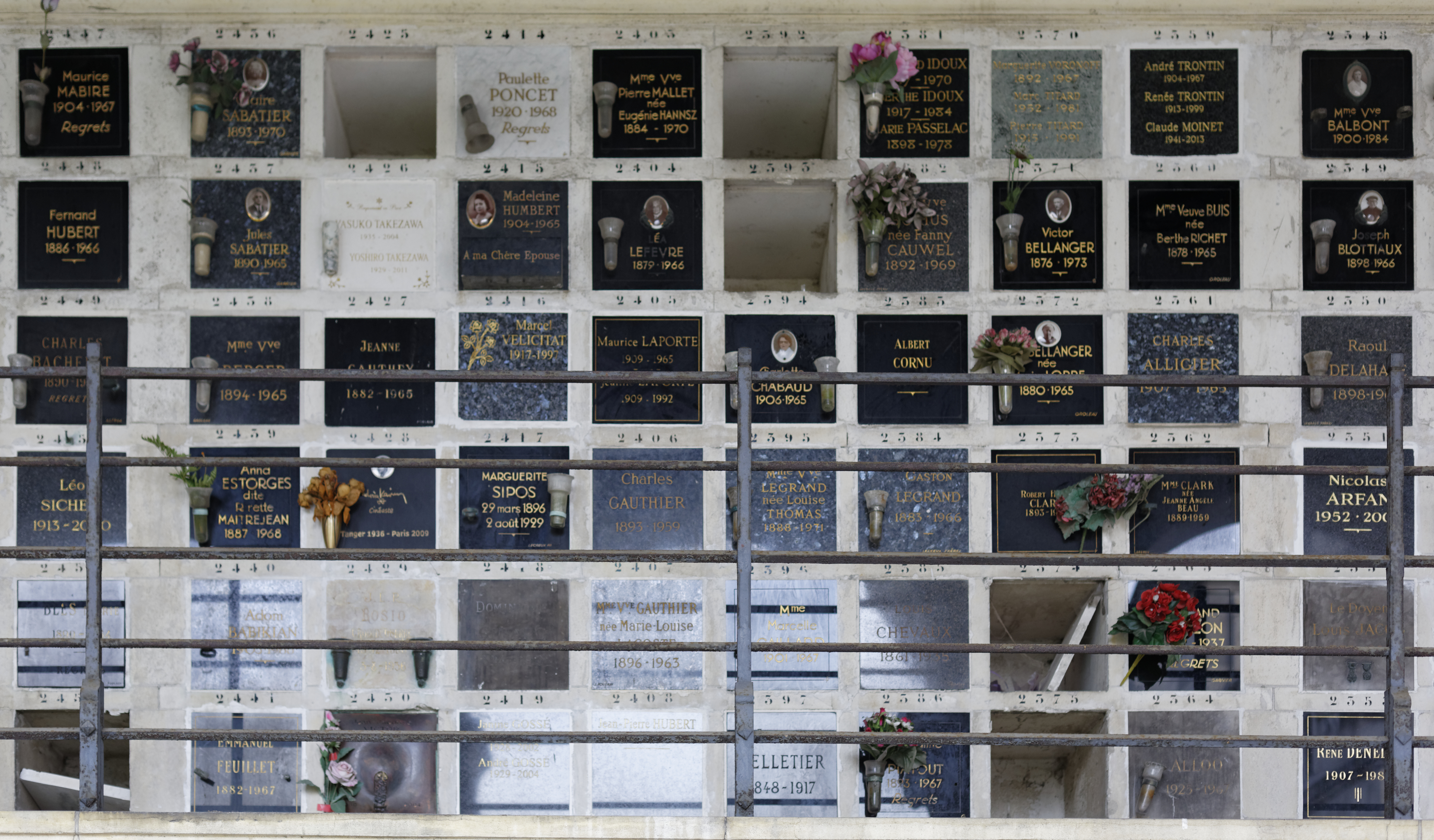 Cases du columbarium du cimetière du Père-Lachaise.